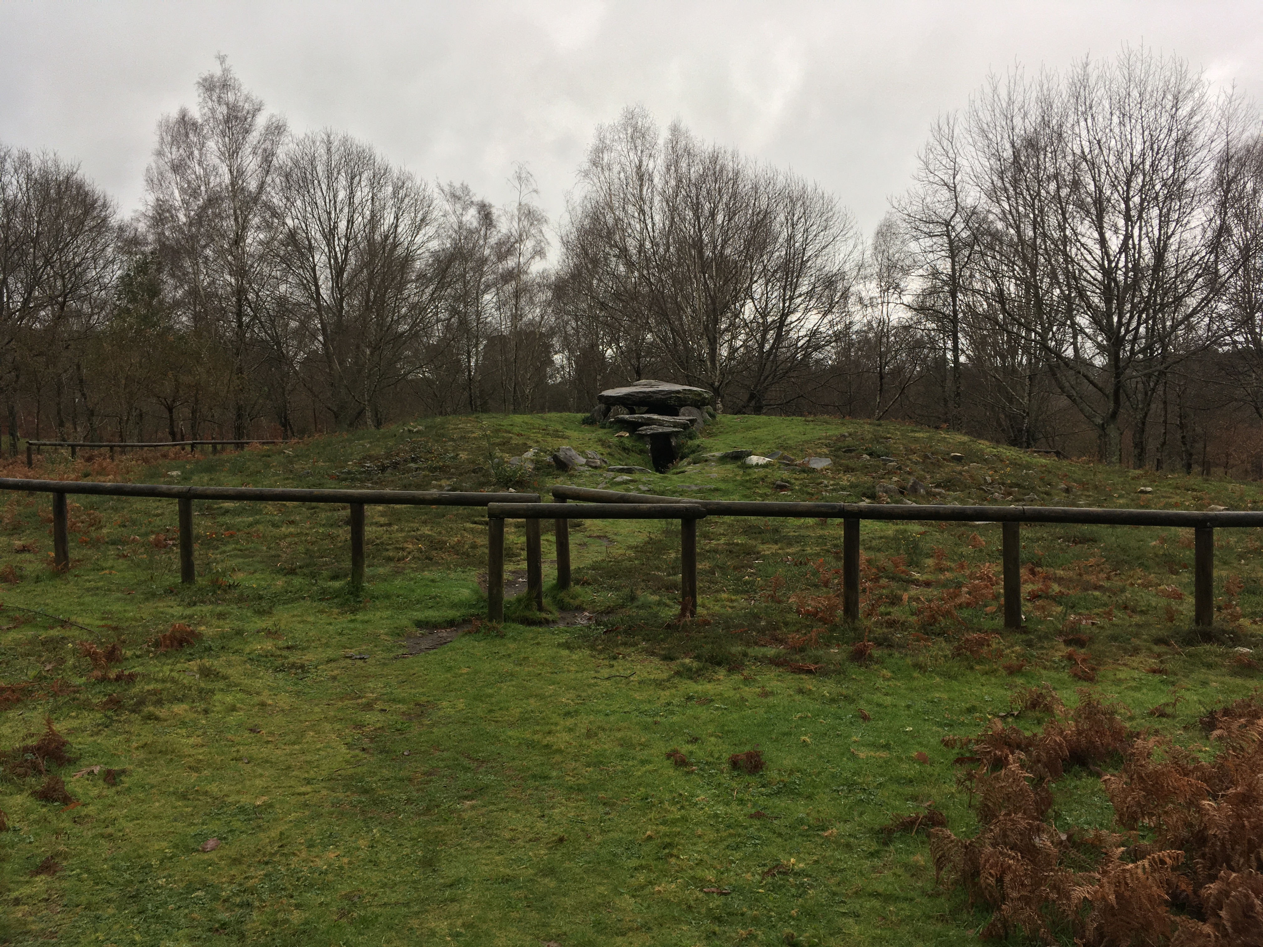 Vista xeral da Mámoa Chan de Castiñeiras I (tamén coñecida como Mámoa do Rei), na que vese tanto a entrada ó dolmen coma o montículo de terra.